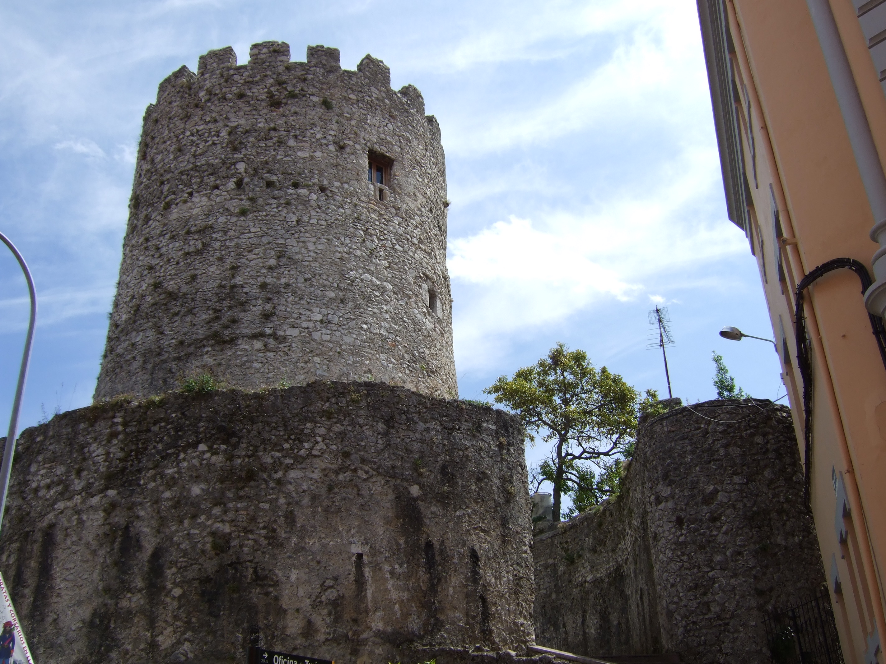 Llanes, torre de las murallas del castillo